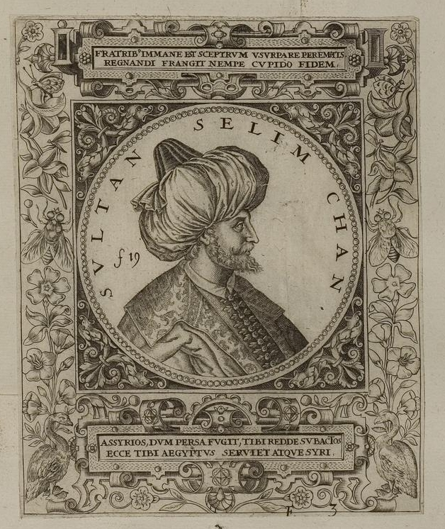 Grafik aus dem Klebeband Nr. 1 der Fürstlich Waldeckschen Hofbibliothek Arolsen Illustration aus: Georg Greblinger: Wahre Abbildungen der Türckischen Kayser vnd Persischen Fürsten / so wol auch anderer Helden und Heldinnen von dem Osman / biß auf den andern Mahomet. Johann Ammon, Frankfurt 1648 Motiv: "Sultan Selim Chan" (Selim I.)